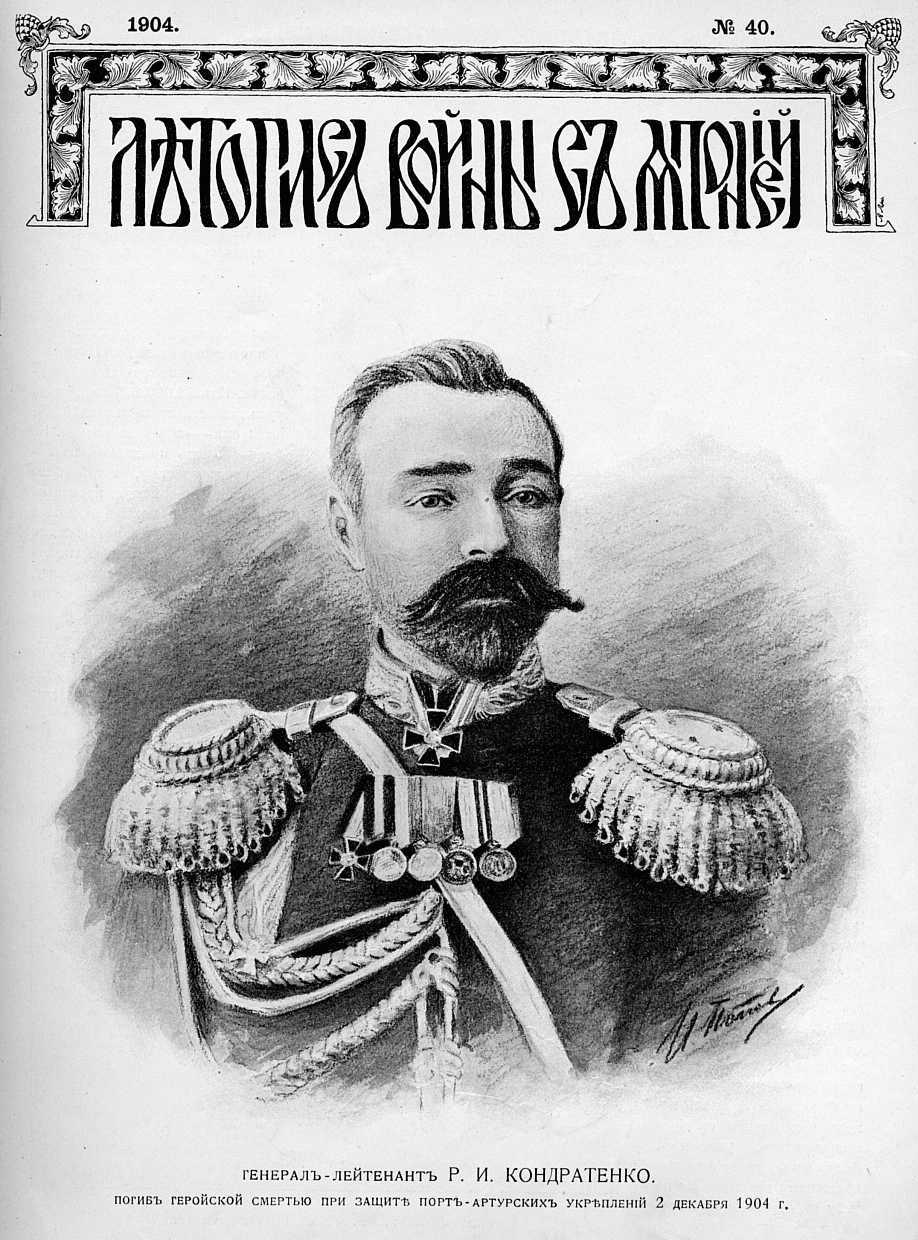 Обложка Летописи войны с Японией